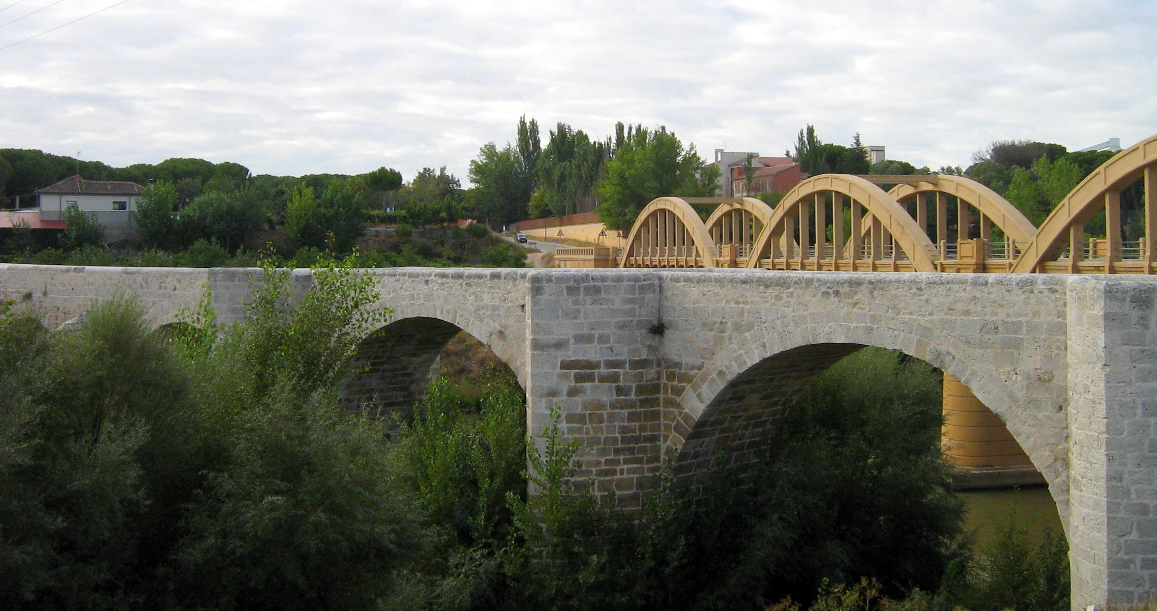 Campo de Peñafiel. GR-14. Carretera VA-101. Puente sobre el río Duero. Puente medieval. Ribera del Duero. Valladolid.